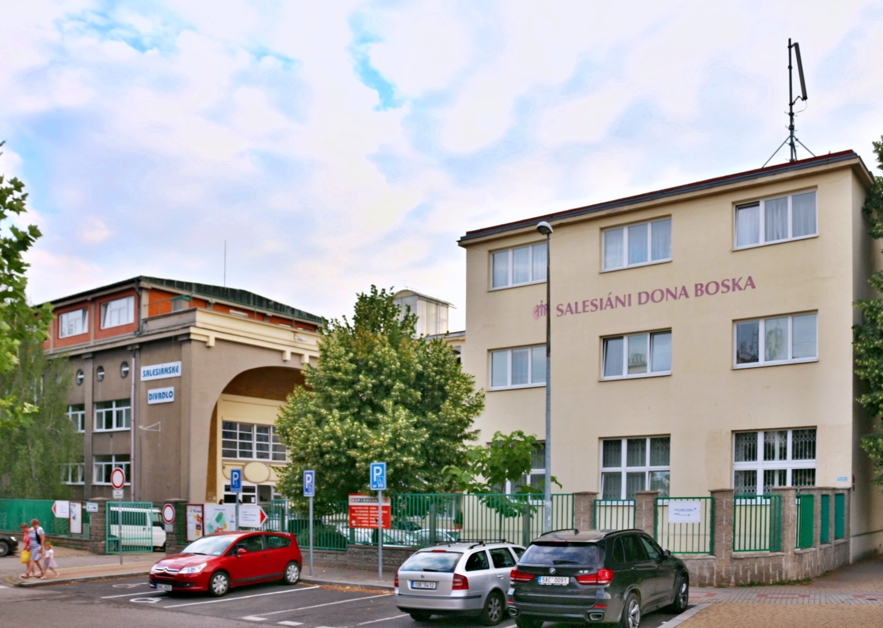 Kobylisy kostel sv. Terezie